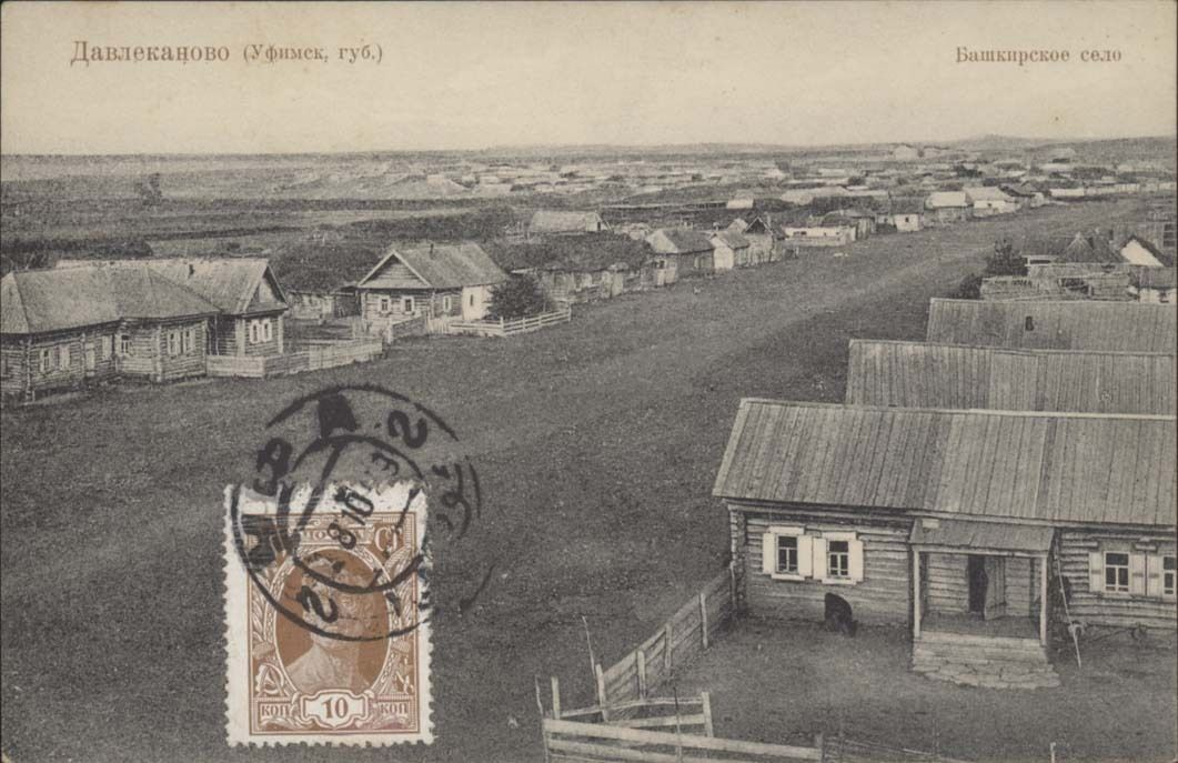 Башкортостан Давлека́ново (башк. Дәүләкән)